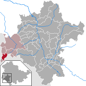 Frankenheim/Rhön in Thuringia - District Schmalkalden-Meiningen